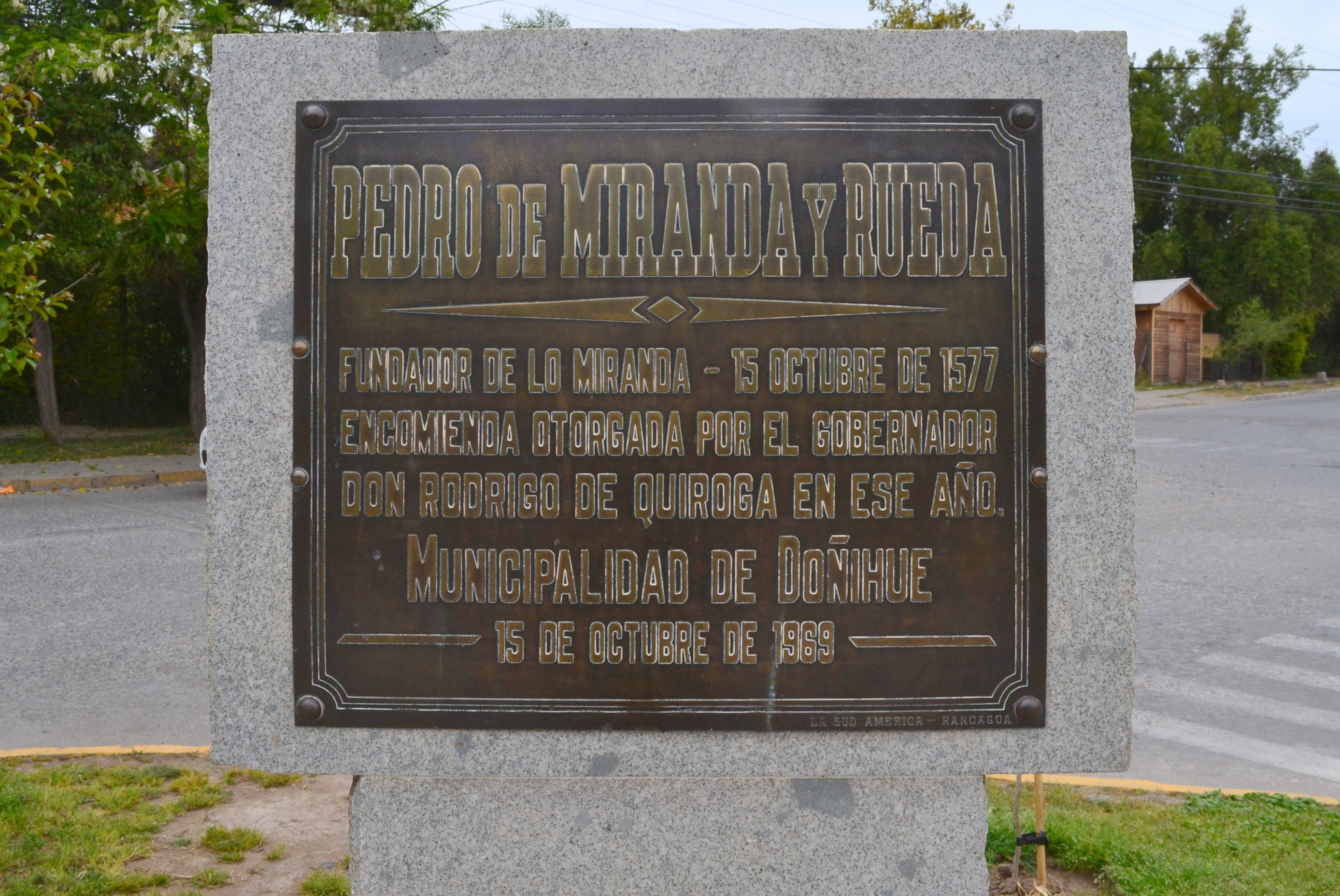 Placa conmemorativa de la fundación del pueblo de Lo Miranda en 1577